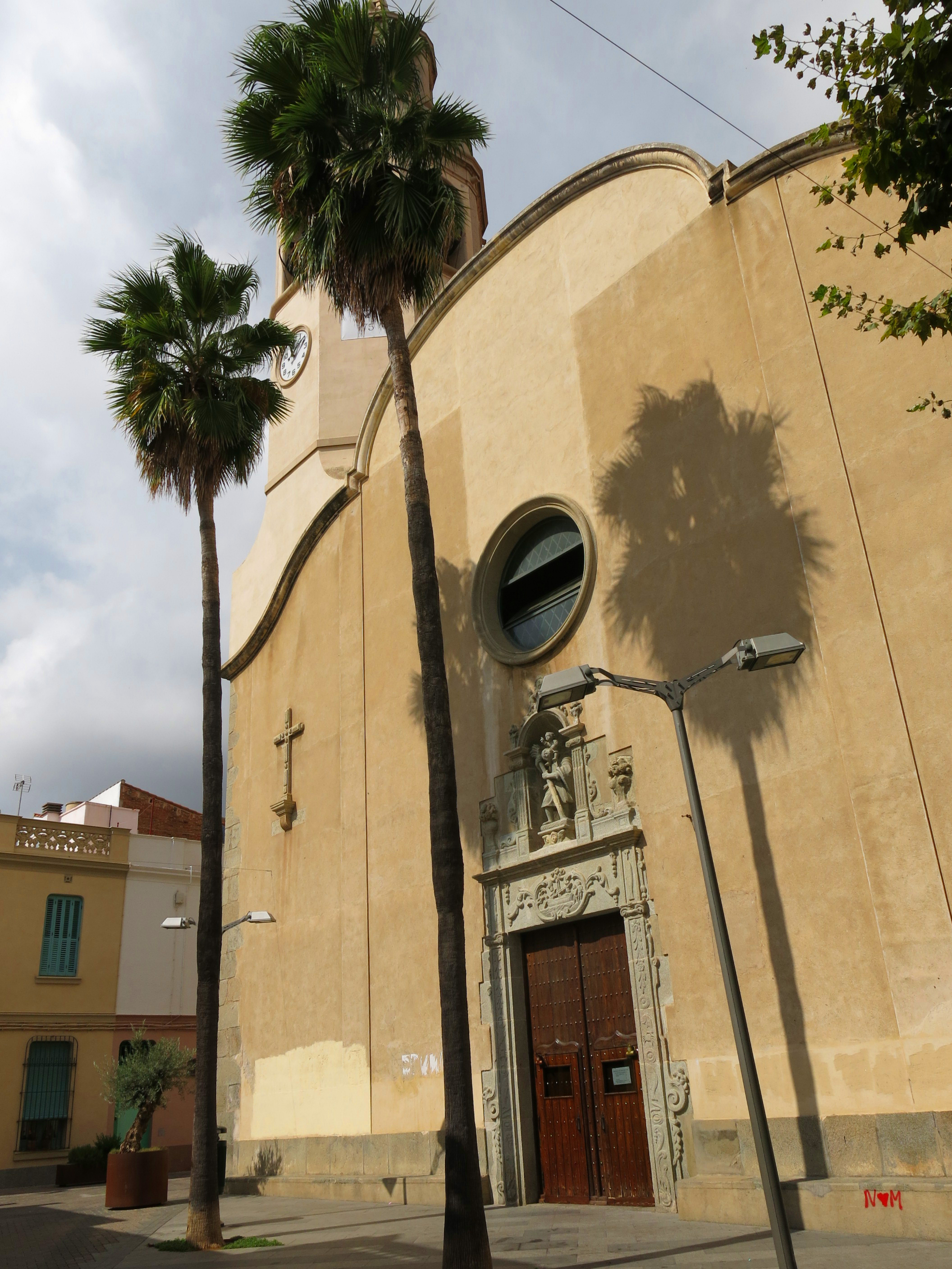 Església parroquial de Sant Cristòfol de Premià (Premià de Mar)